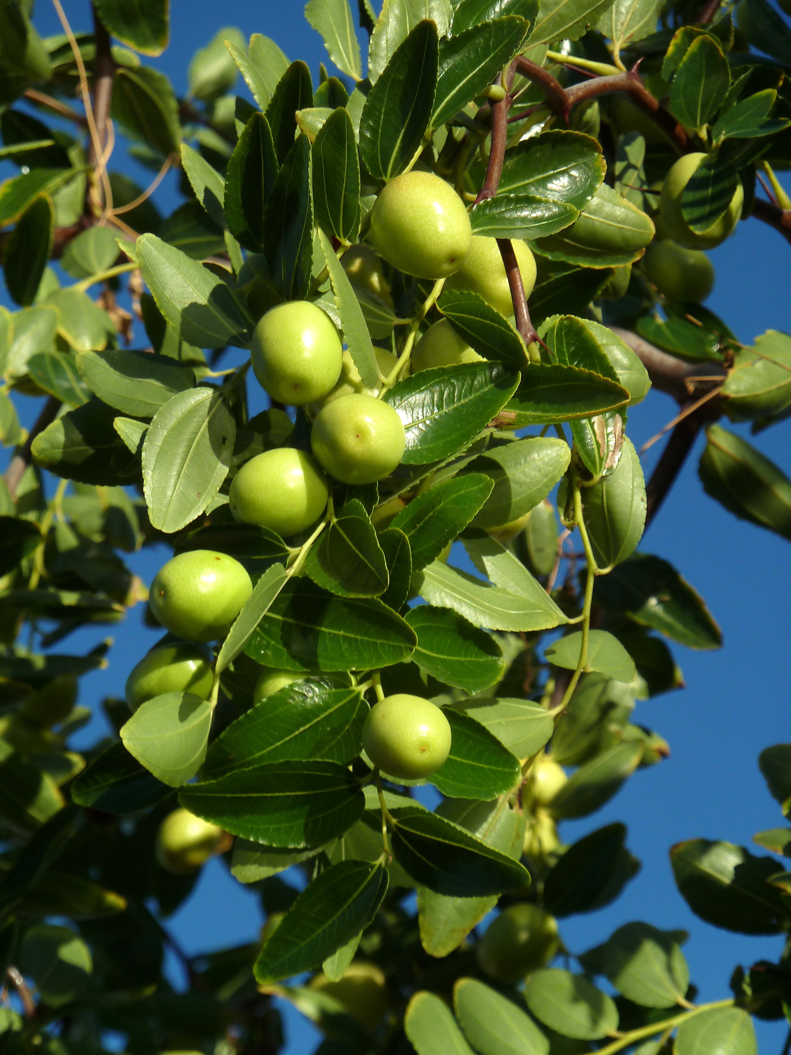 Ziziphus jujuba (Jinjolero, azufaifo) - Frutos inmaduros in situ. - Cultivado, Camino de la Azarbe de Patricio, Albatera (Provincia de Alicante, España).